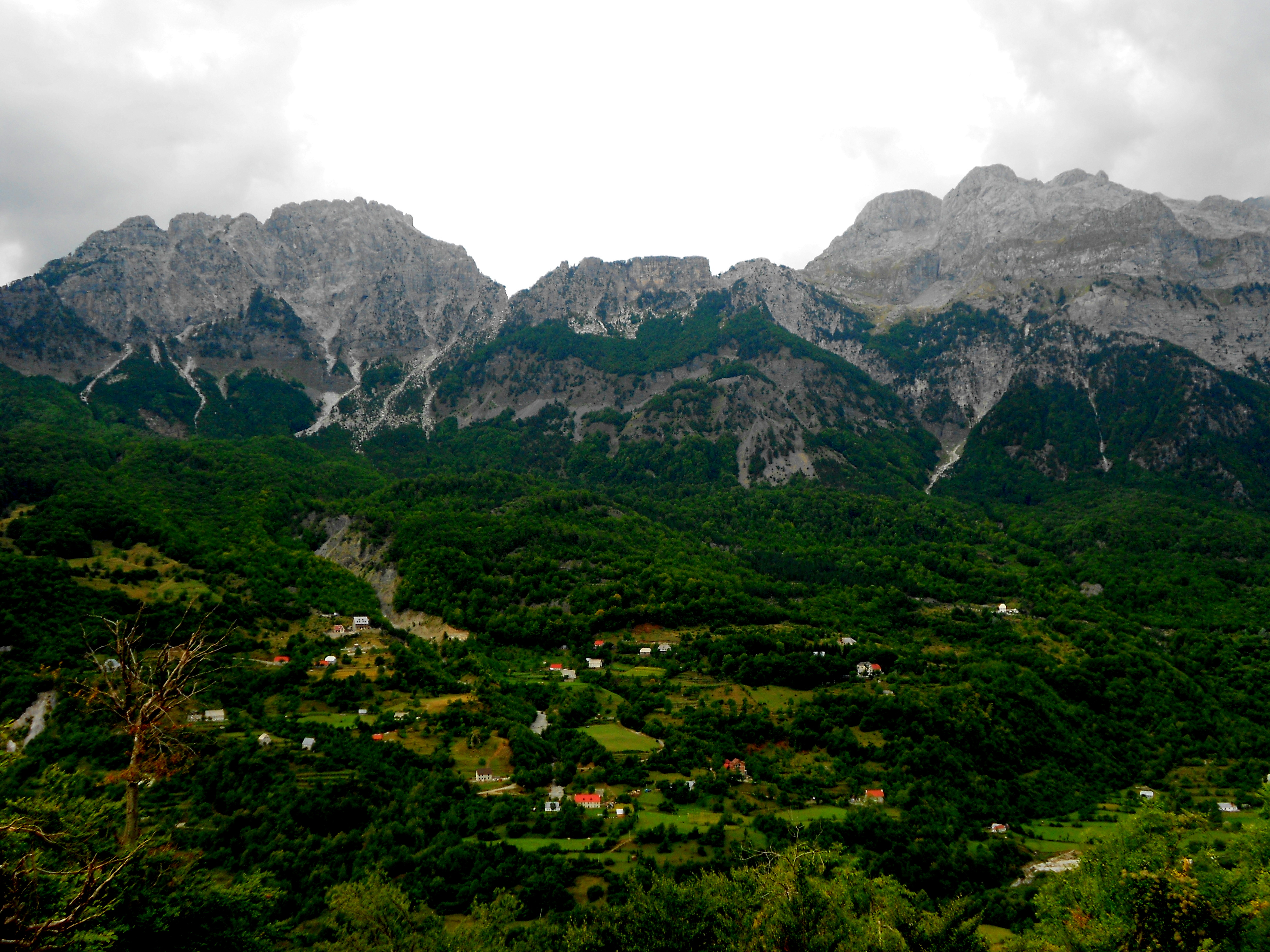 Thethi, Shkoder